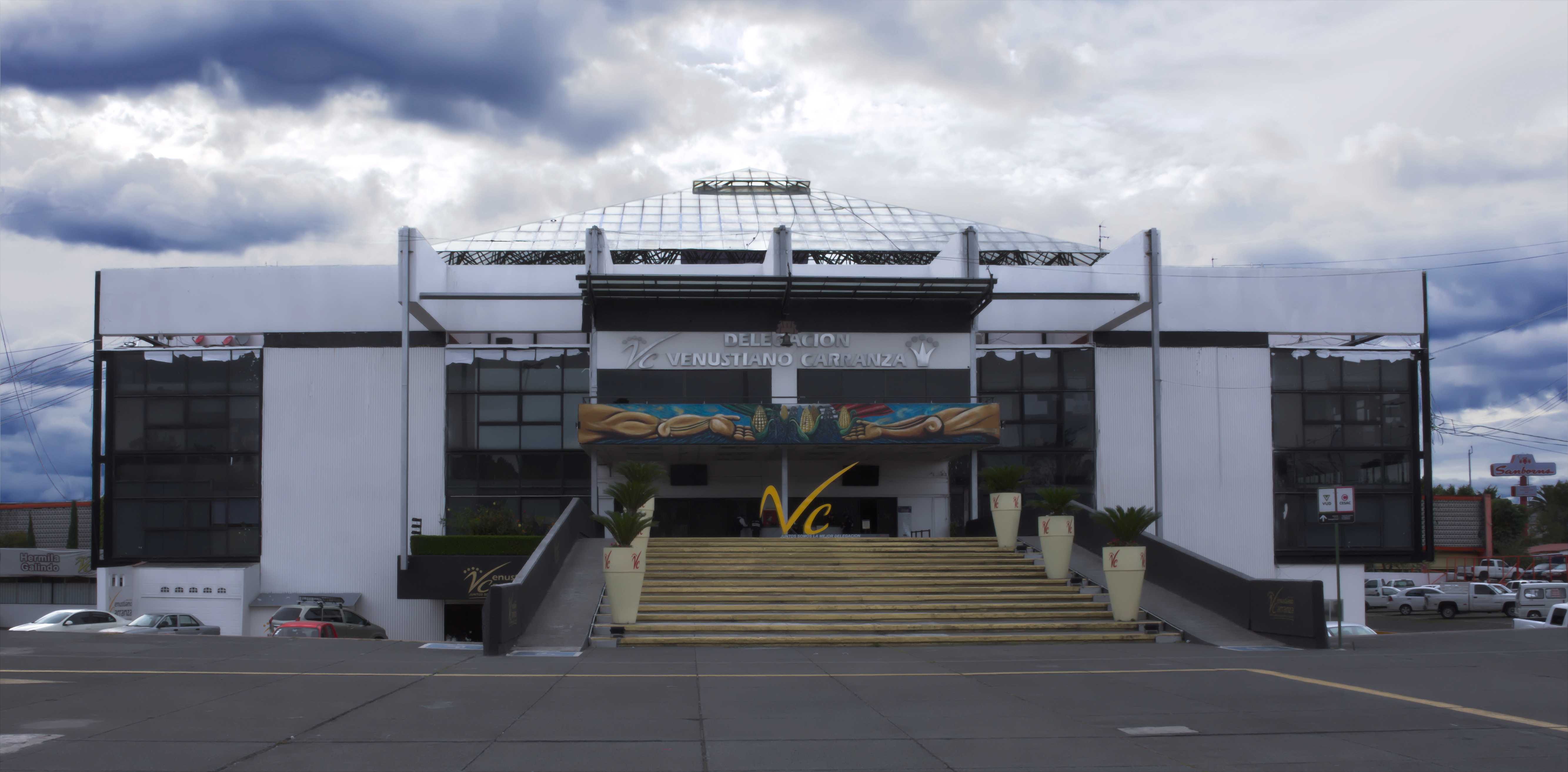 Edificio sede de la delegación Venustiano Carranza en la ciudad de México